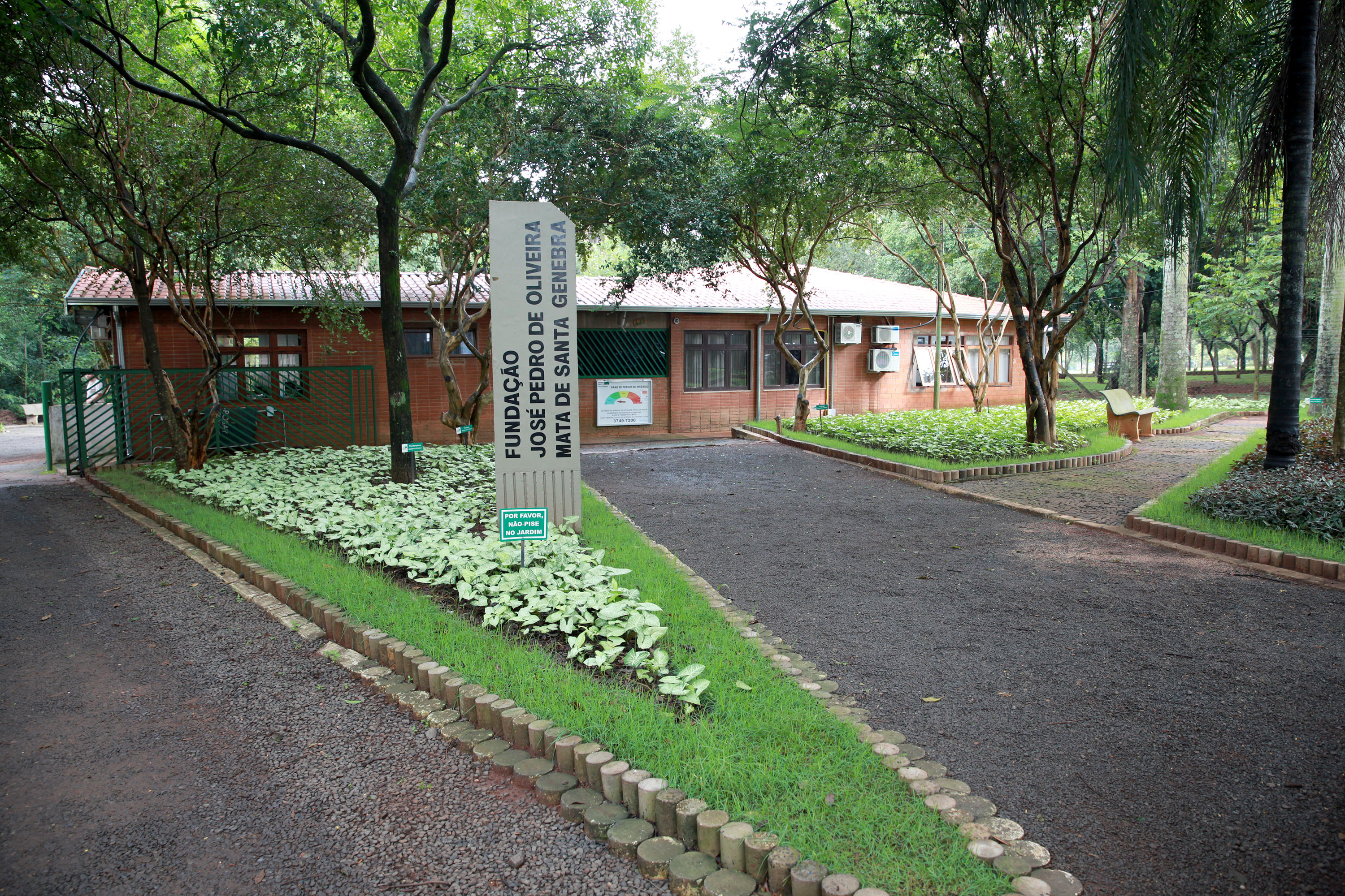 Posse presidente Mata Santa Genebra Fotógrafa Fernanda Sunega